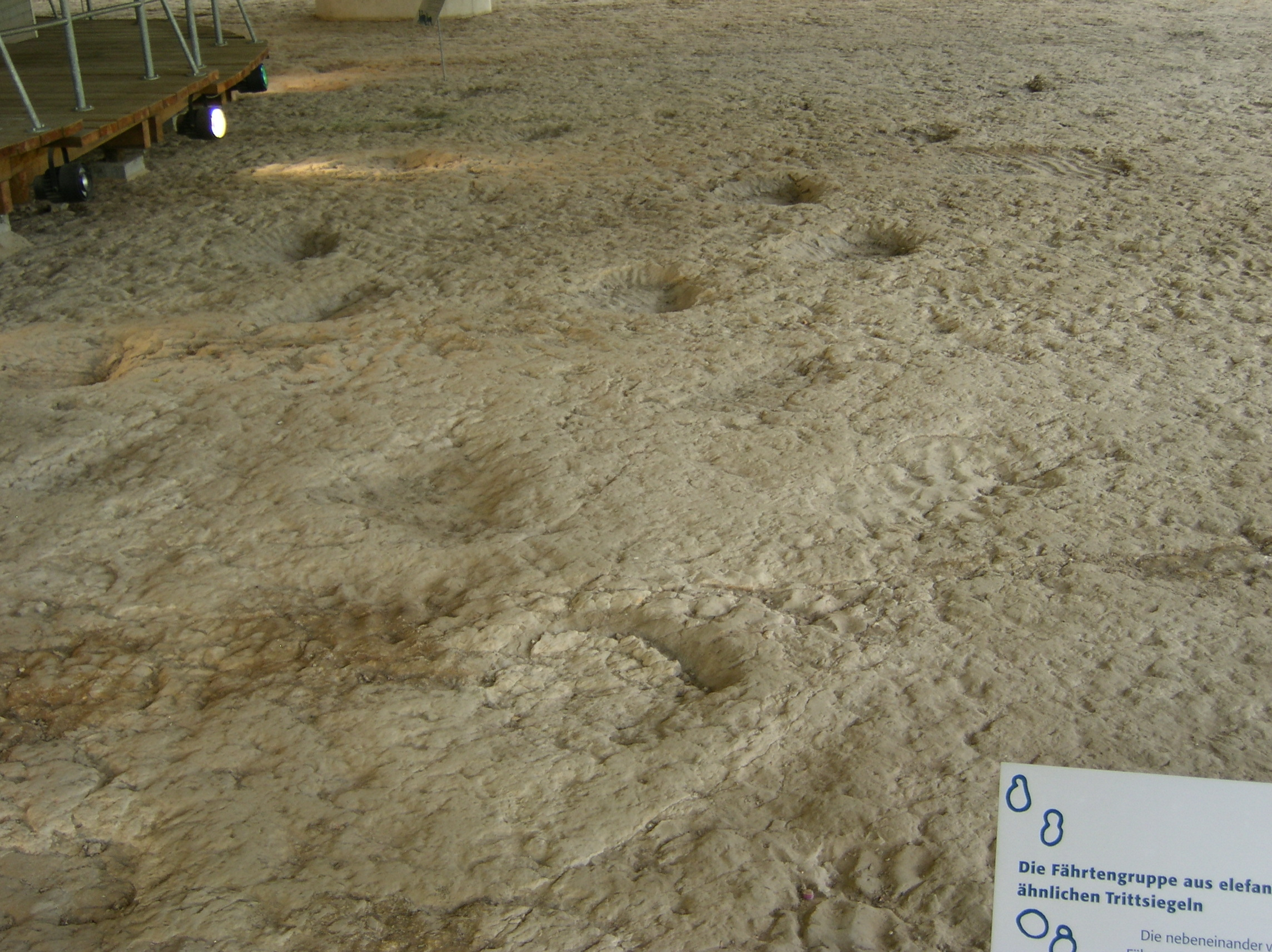 Trittsiegel von Saurier in Dinosaurierpark Münchehagen.